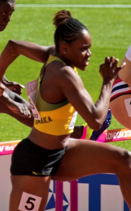 d7_3 zagré 100mH